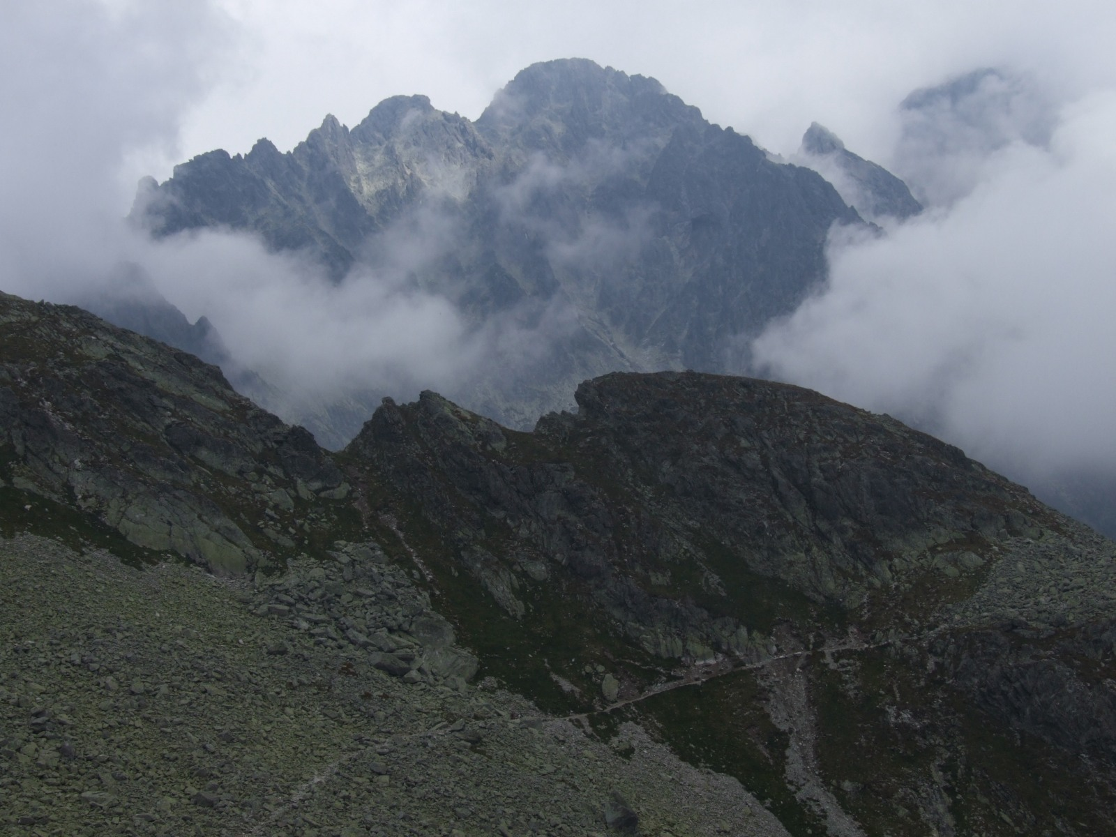 Widok z Czerwonej Ławki na Dolinę 5 Stawów Spiskich. Ponad Lodowym Grzebieniem widoczne Mały Durny Szczyt i Durny Szczyt